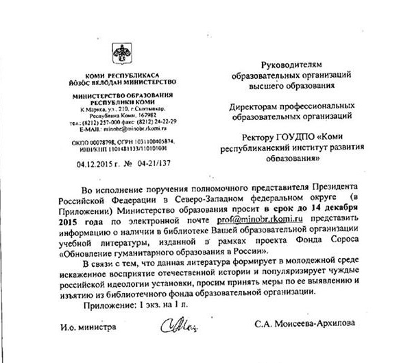 Поручение и.о. министра образования и молодёжной политики Республики Коми об изъятии книг, изданных при поддержке Фонда Сороса . См. также [